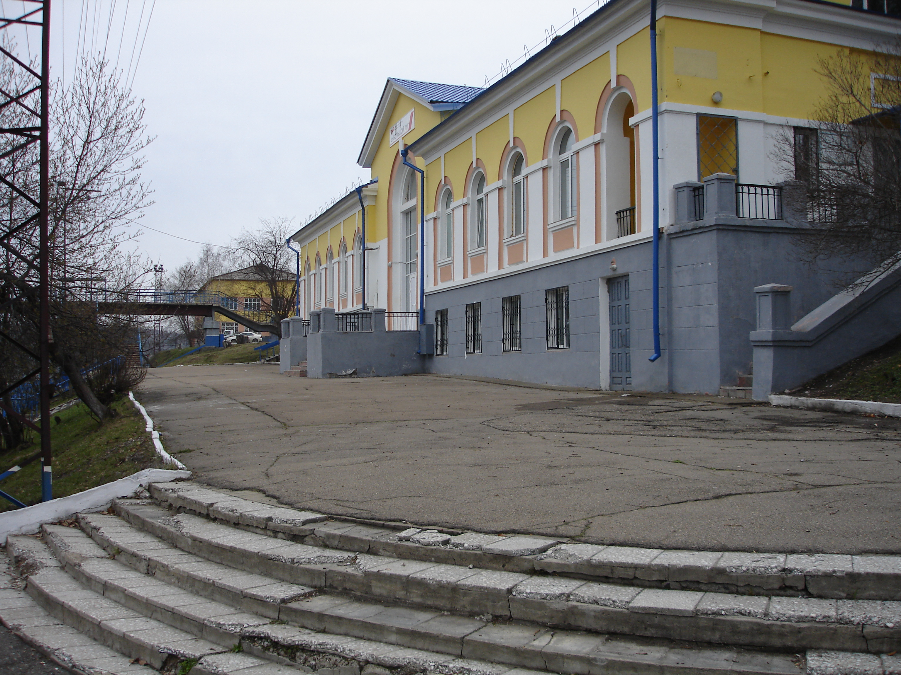 станция Большой луг